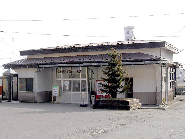 Urakawa Station in Hidaka Main Line, Japan